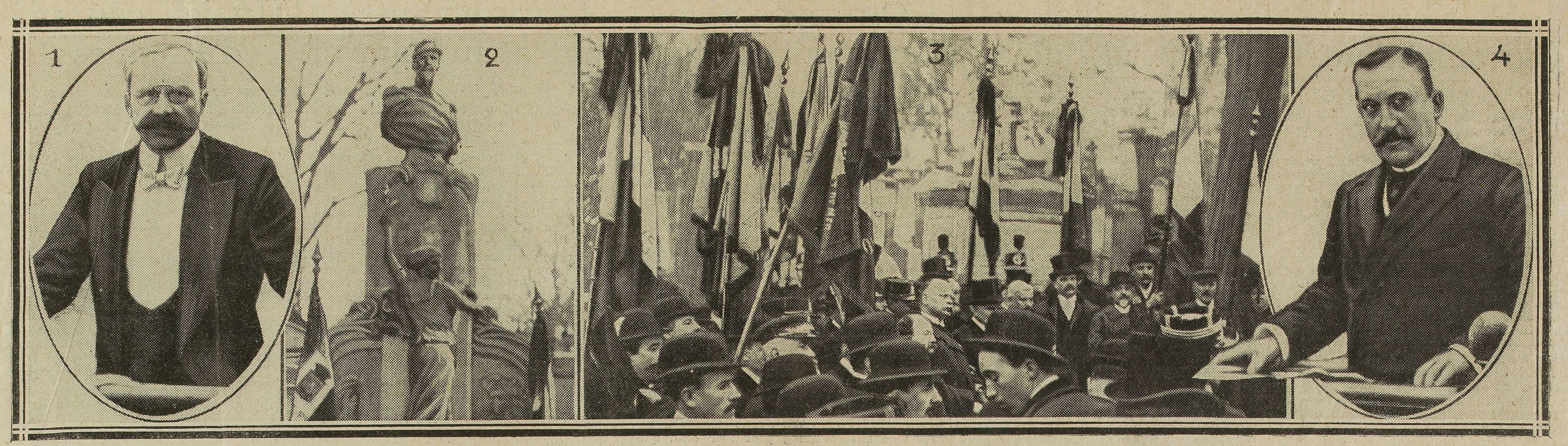 Inauguration du monument des défenseurs de Belfort : M. Messimy prononçant son discours. Le nouveau monument. Les drapeaux des délégations. Félix Roussel, président du conseil municipal, prenant la parole0